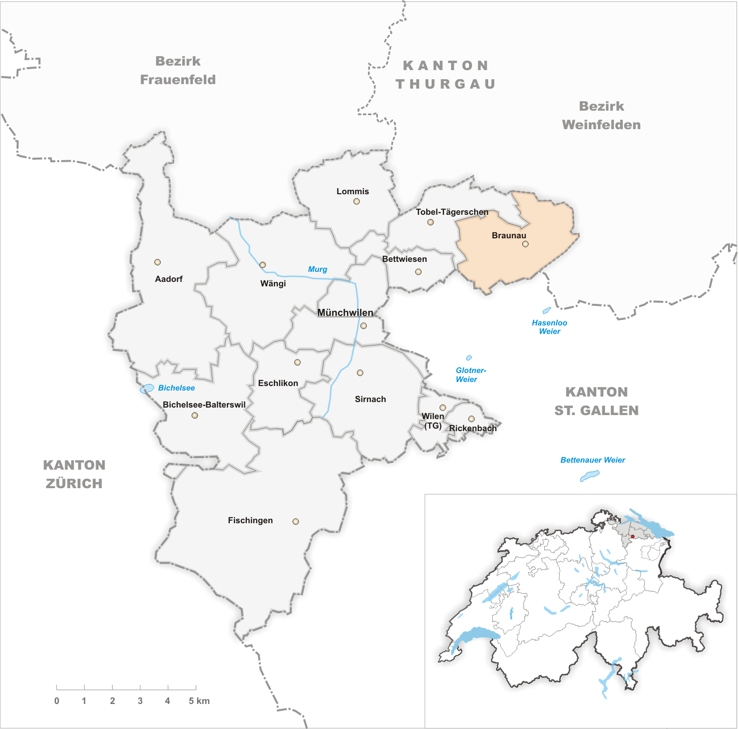 Municipality Braunau